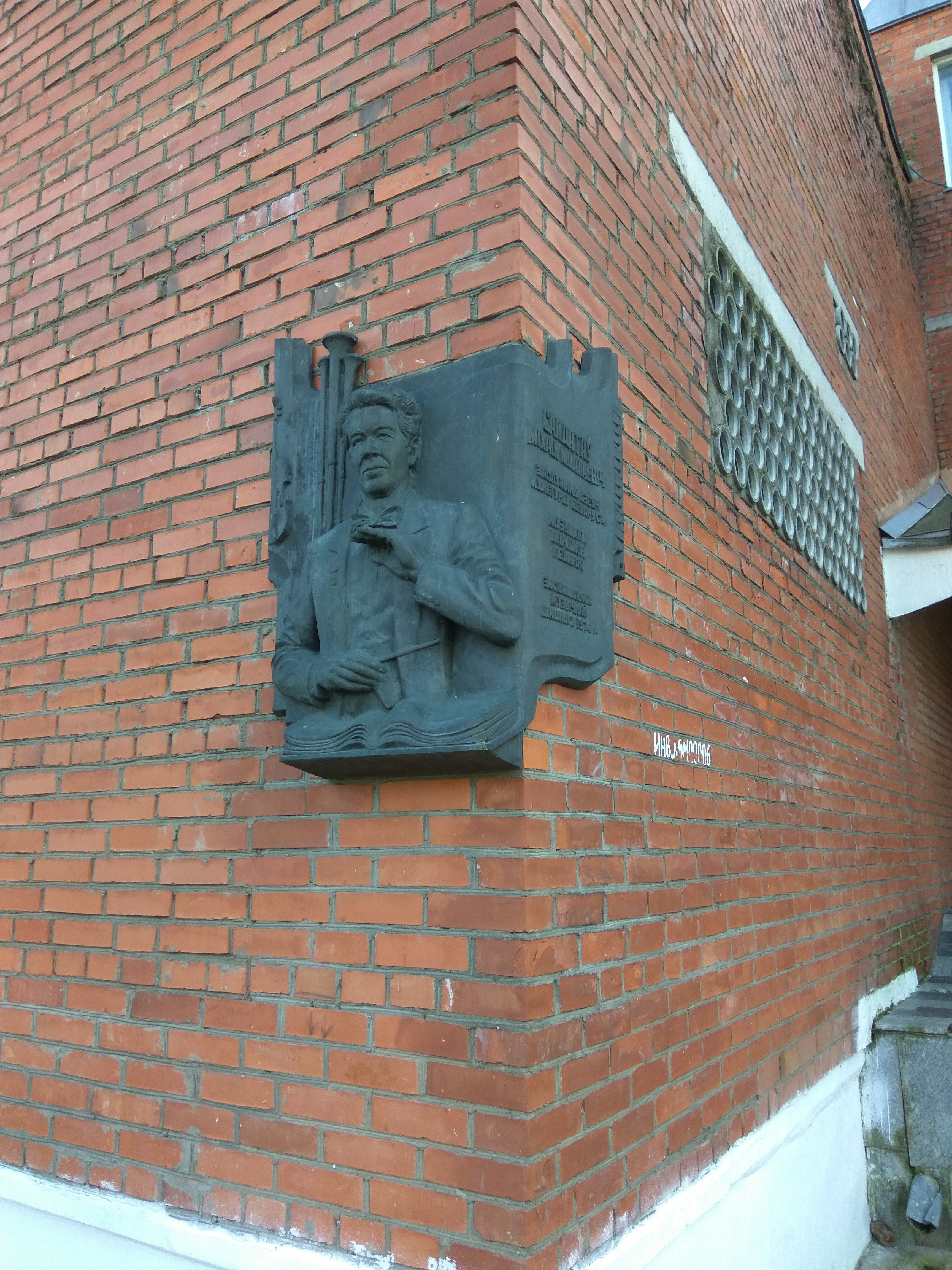 Магілёў. Парк імя 60-годдзя Вялікага Кастрычніка. Магілёўская дзіцячая школа мастацтваў №3